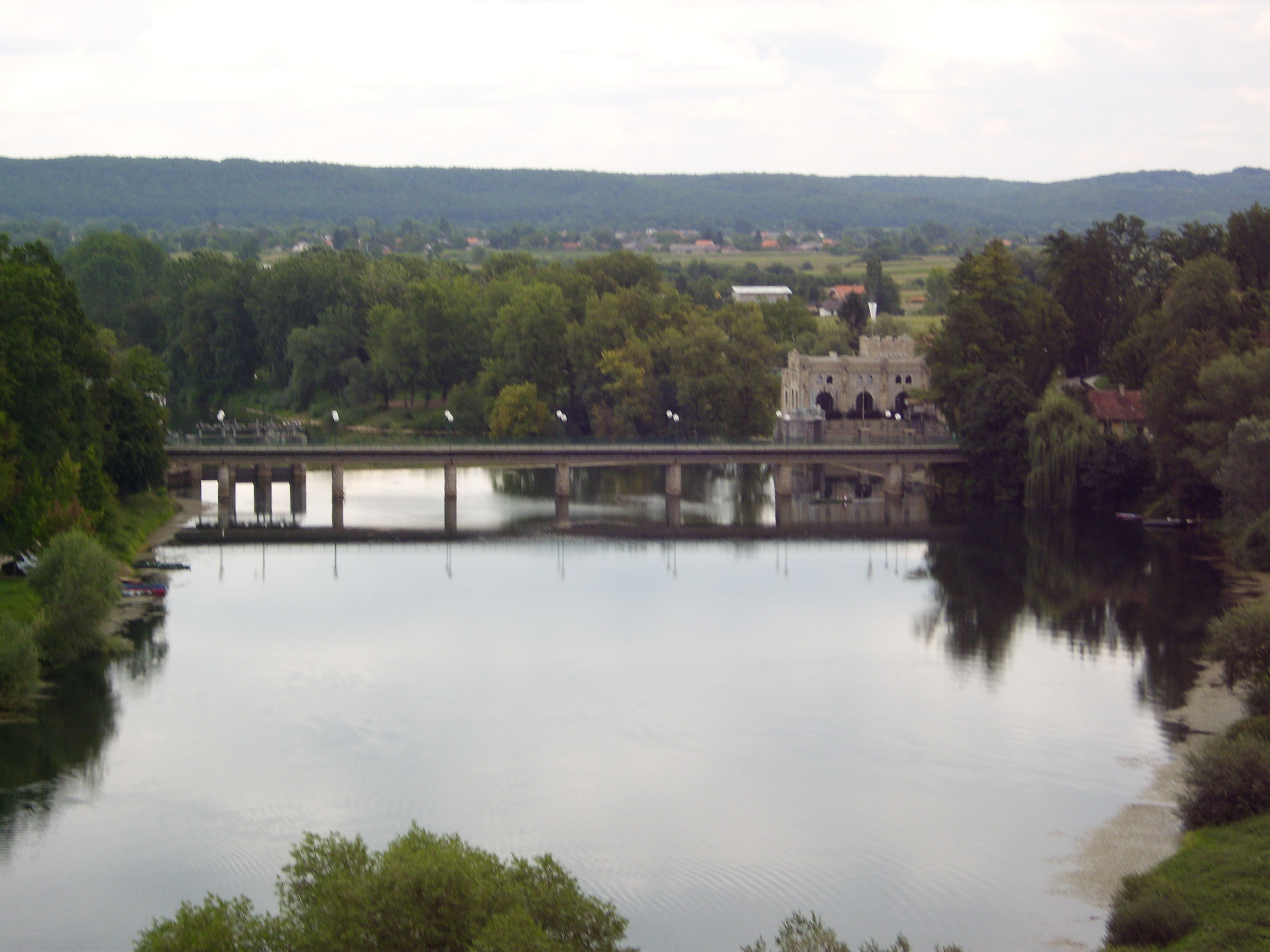 Fluss Kupa mit Blick auf das 1907-1908 in Stil der Neurenaissance erbaute Wasserwerk Munjara der Stadt Karlovac oberhalb des Wasserfalls bei Ozalj. Ein schlosshafter Technikbau mit kronenartigen zackigen Ornamenten und gleichmäßigen Arkaden erzeugen mit Wasserkraft 3,5 Megawatt.